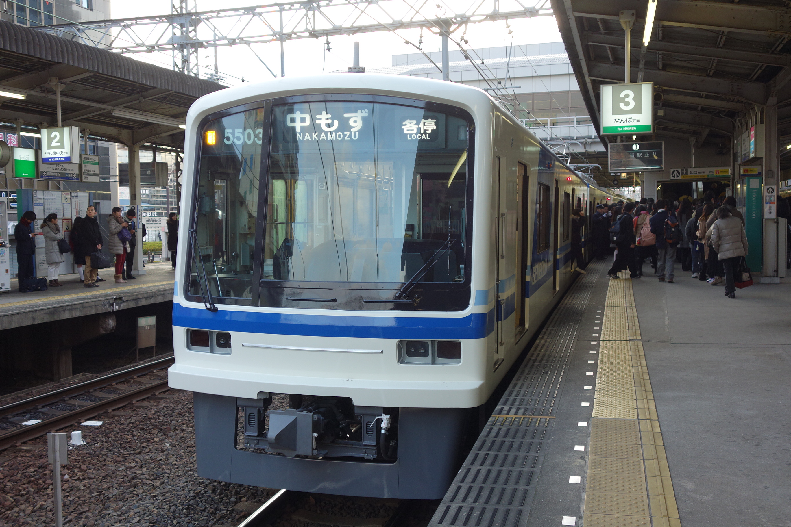 大阪府都市開発(泉北高速鉄道)5000系5501編成リニューアル後